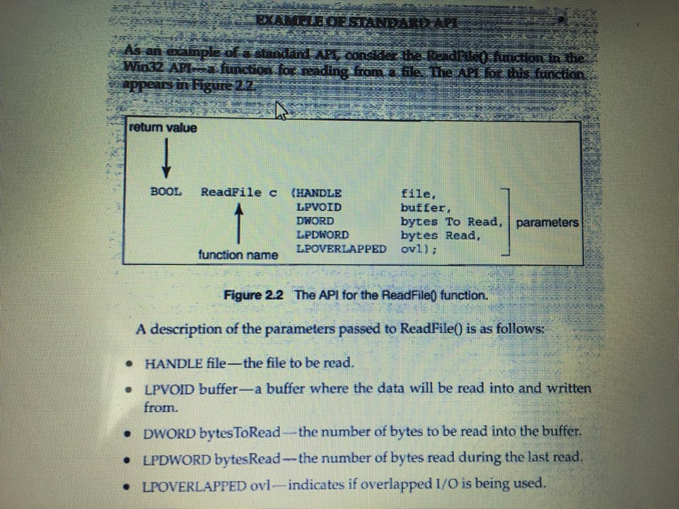 Монгол: Стандарт аппликейшн програмчлалын интерфейс